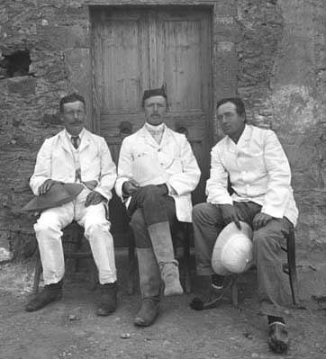 Robert Carr Bosanquet (Mitte) mit Richard MacGillivray Dawkins (links) und Charles Trick Currelly (rechts), Ausgräber von Roussolakkos 1903–1905.